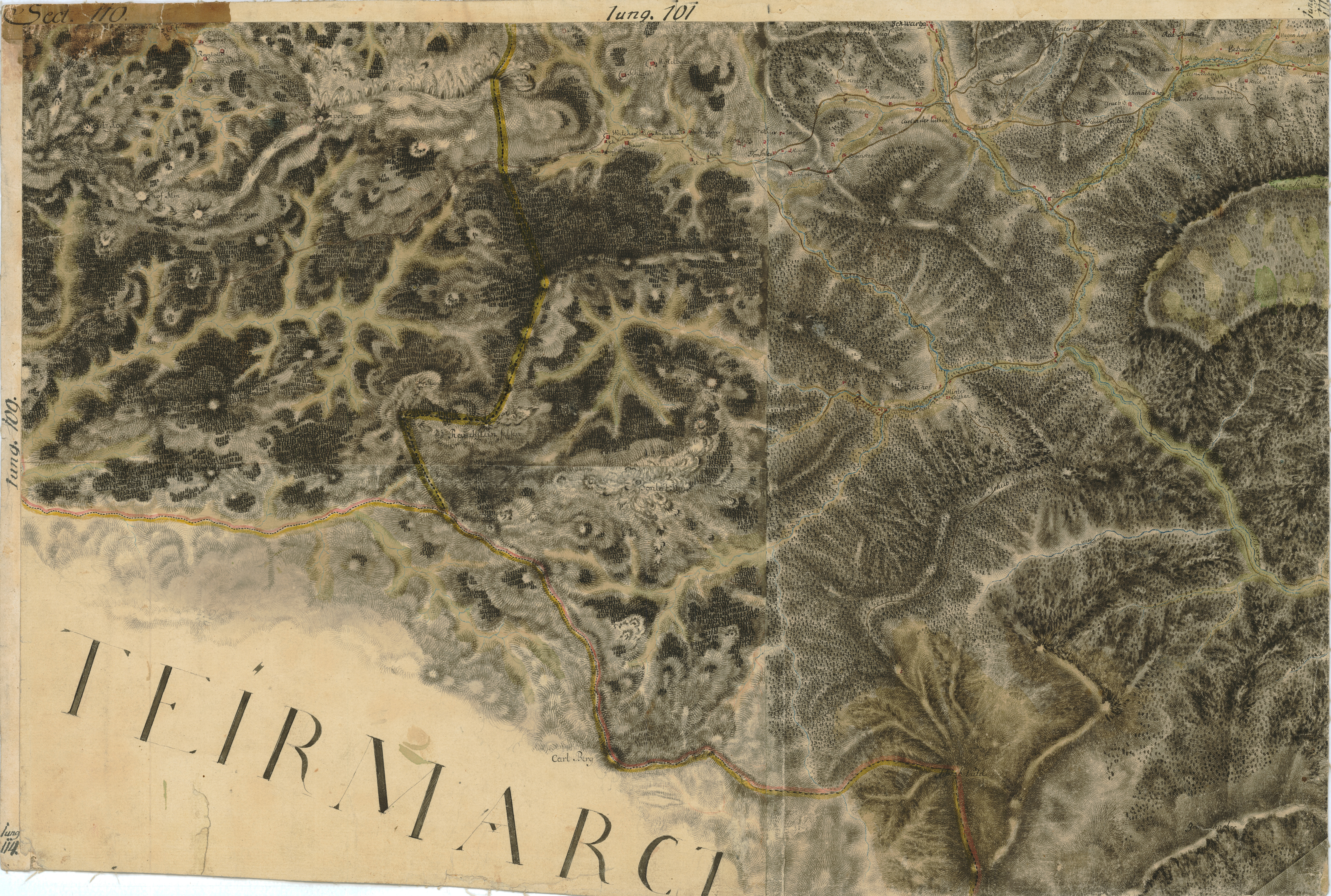 historische Landkarte BIXa242 sect.110c Josephinische Landesaufnahme: Rax, Höllental, Naßwald, Grünschachen auf dem Raxplateau, niederösterreichische Seite, Niederösterreich, Österreich